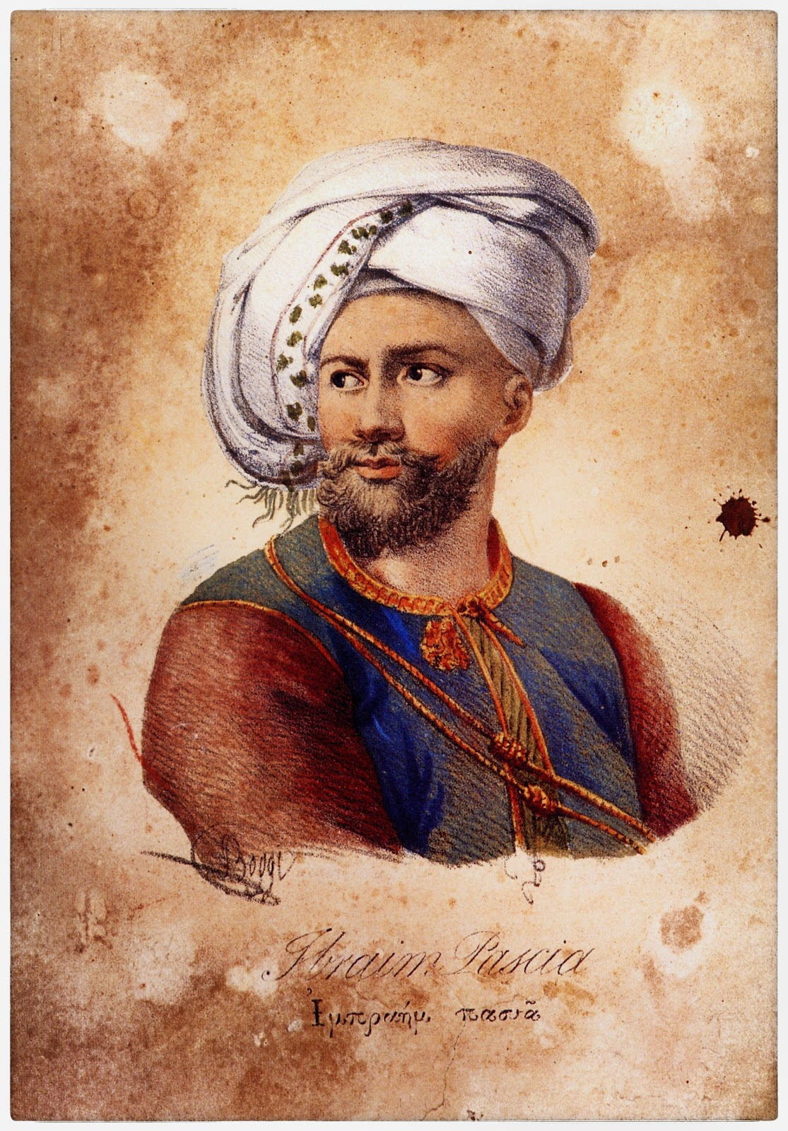 Ibrahim Bajá, pachá otomano de Egipto (1789-1848)